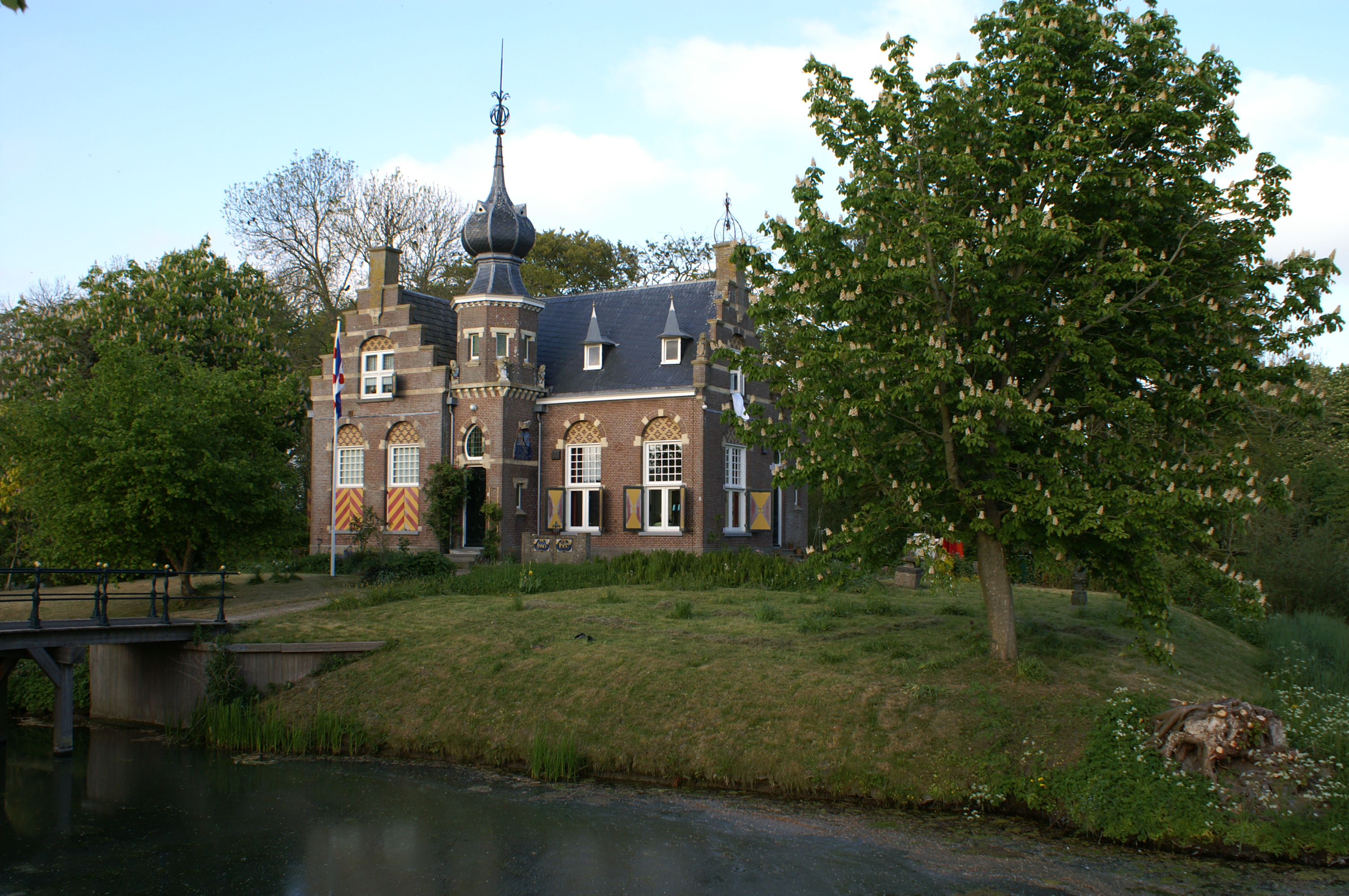 Martena State te Cornjum.